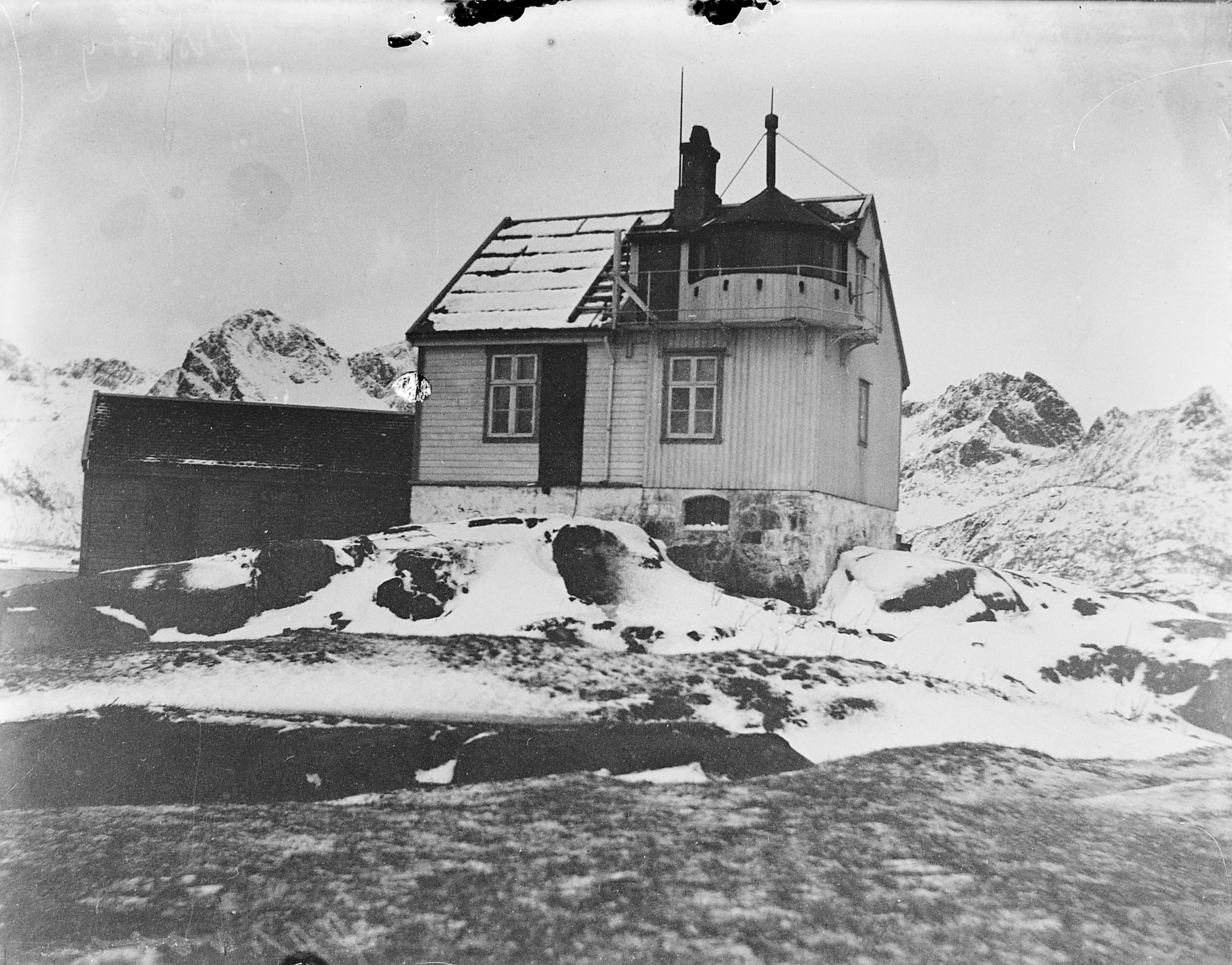 Bildet er hentet fra Arkivverket. Ørsvåg, Vågan Arkivinstitusjon : Riksarkivet Arkivnavn : Fyrdirektoratet Sted : Norge, Nordland, Vågan, Ørsvåg Emneord: Fyr, Kyst Avbildet